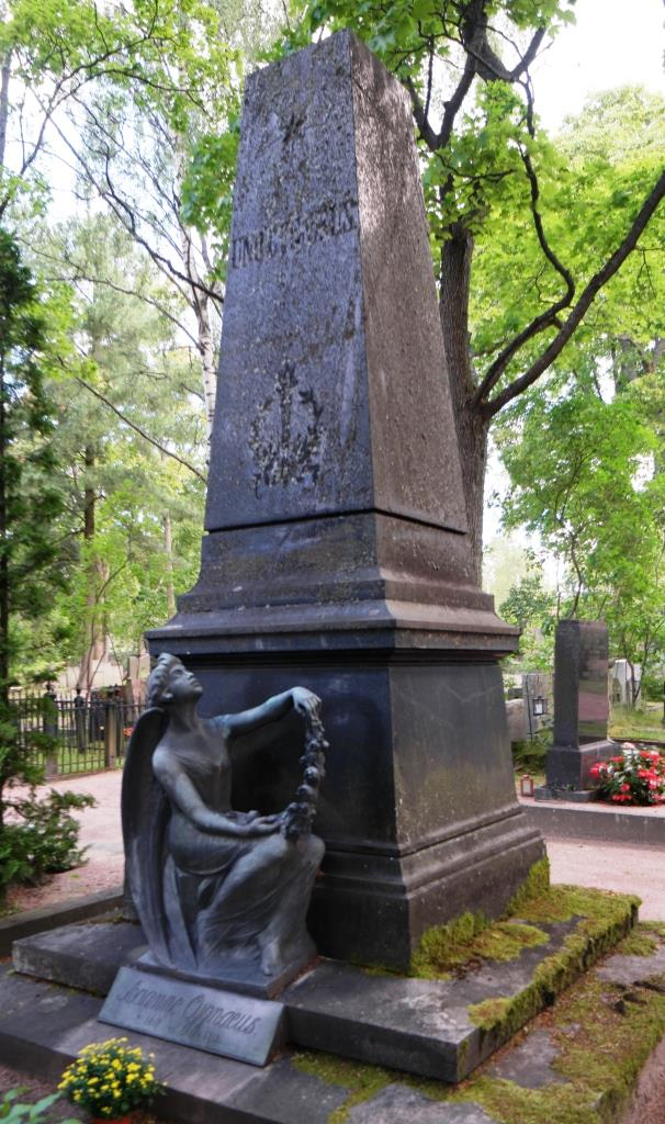 Grab des Pädagogen Uno Cygnaeus (1810-1888) auf dem Friedhof Hietaniemi in Helsinki